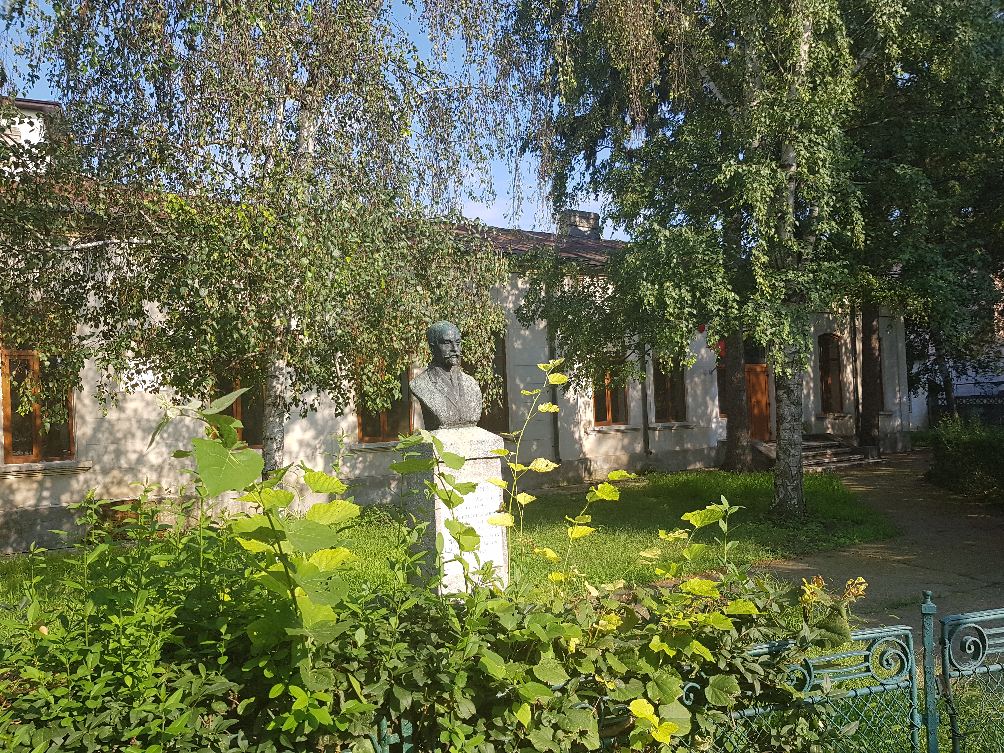 Școala Rarincescu